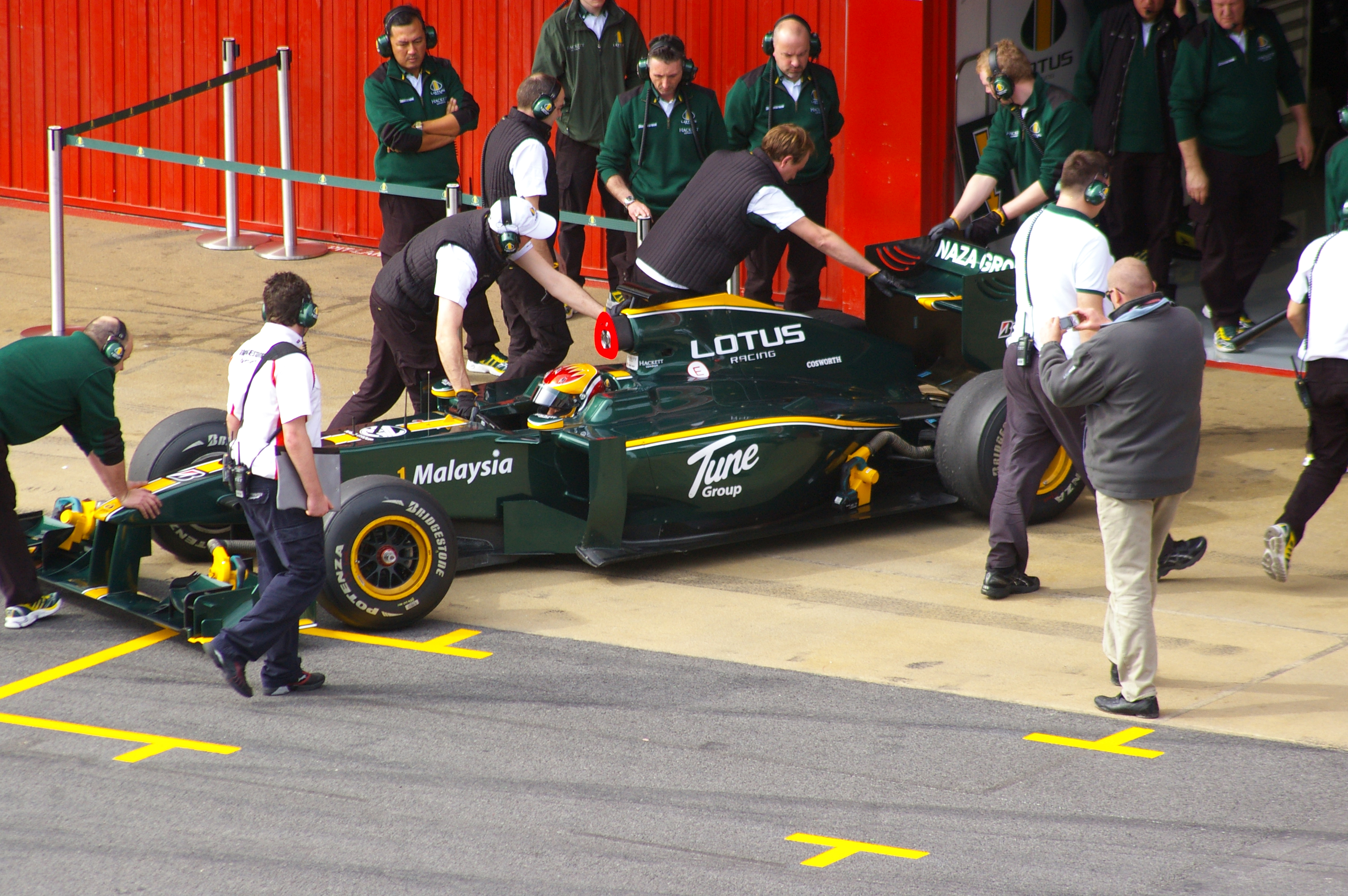 Lotus T127 durant els entrenaments al Circuit de Catalunya